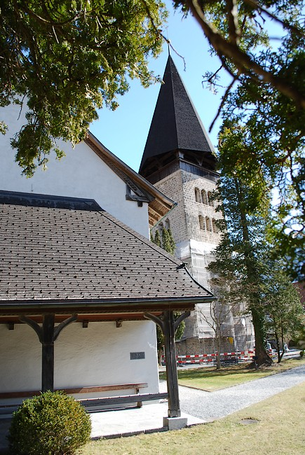 Eglise de Meiringen (canton de Berne, Suisse)